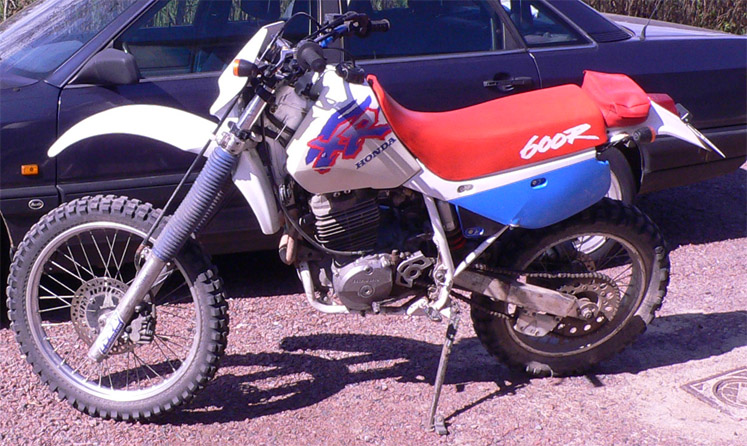 Photo: Honda XR 600R, 1993 Model. Photographer: Daniel Björklund.